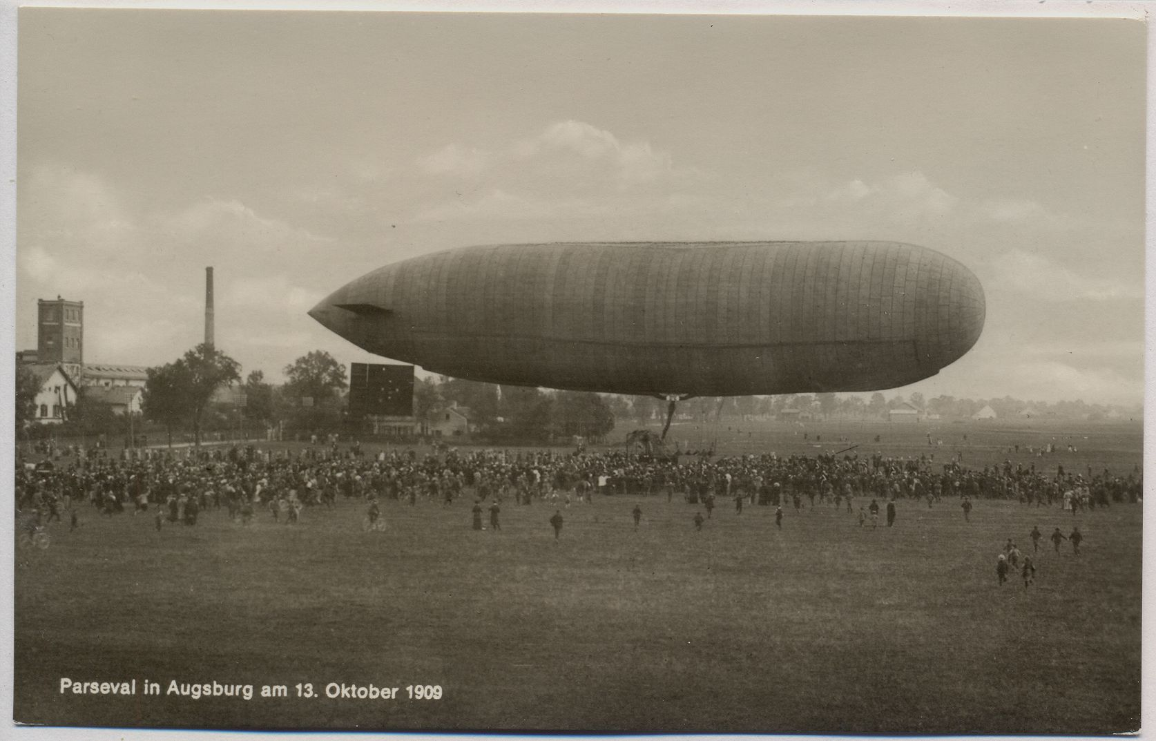 Ansichtskarte - Photo - schwarzweiß - Luftschiff Parseval PL3 "Parseval in Augsburg am 13. Oktober 1909"